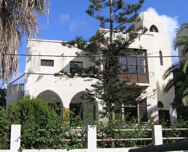 בית ביאליק, בתל אביב. צילמתי בספטמבר 2005 (וצריך לצלם שוב, בלי הענן המעצבן!)